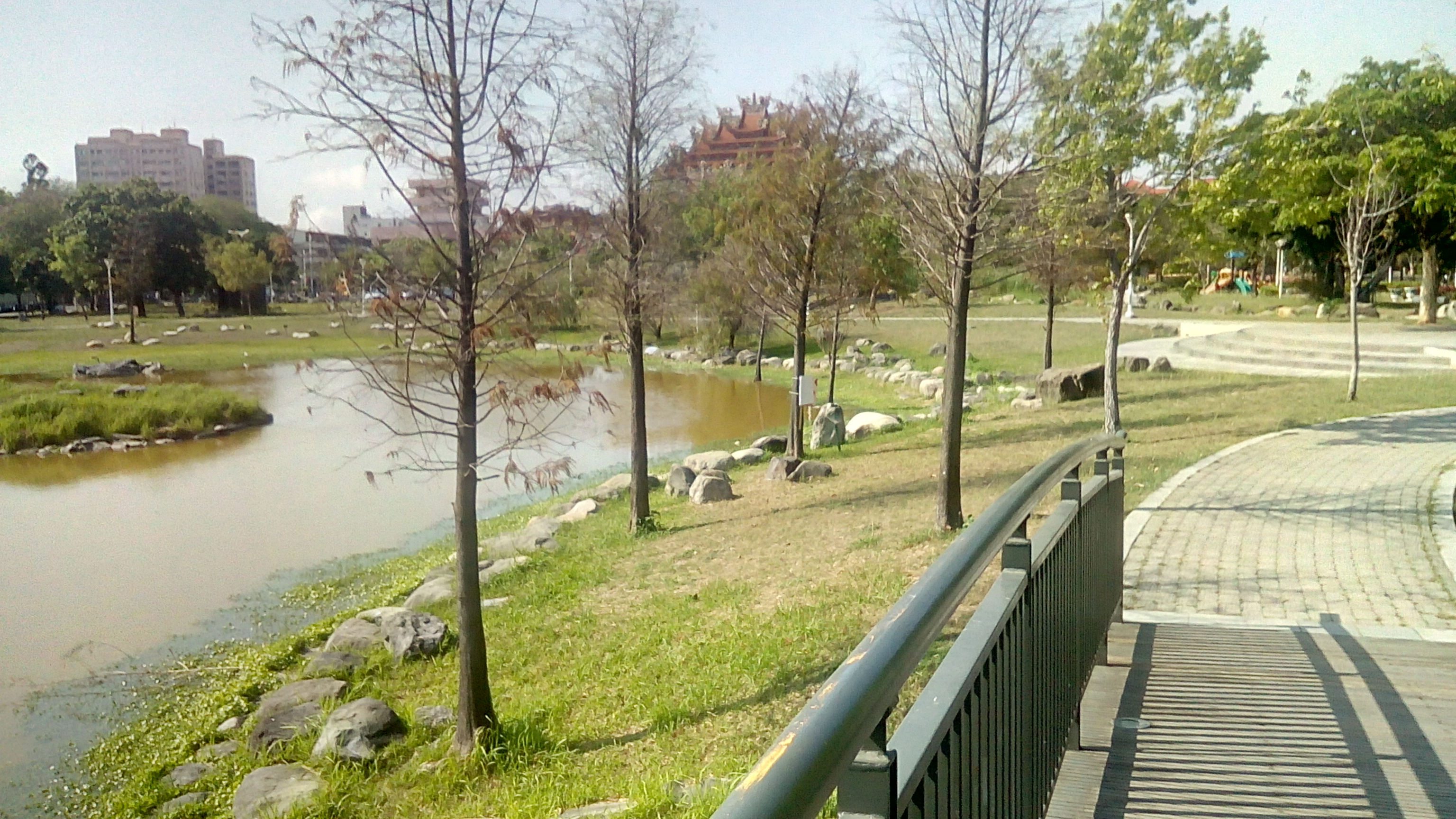 同上 位於壽華路及壽天路口